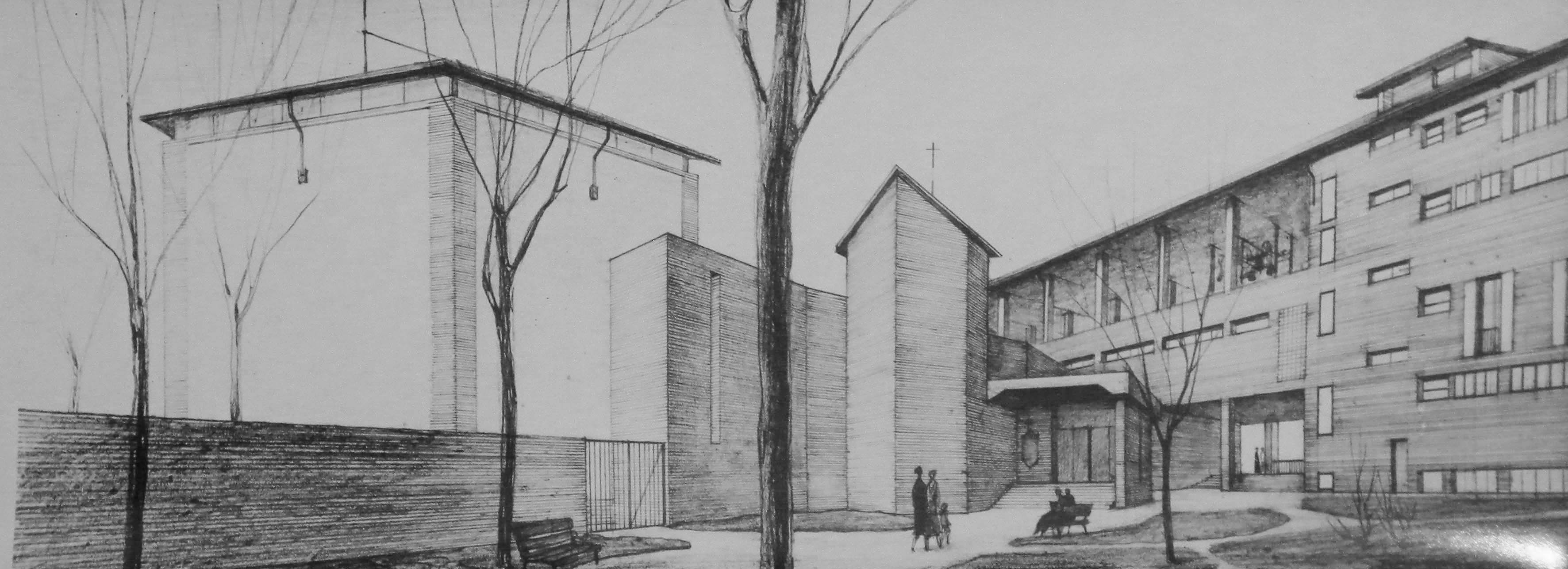 Progetto originale della Chiesa di San Gabriele Arcangelo in Mater Dei.